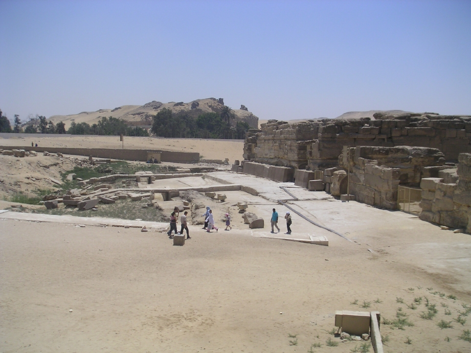 Vue du temple d'accueil du complexe funéraire de Khéphren à Gizeh, avec les vestiges du port devant le temple et à sa gauche la façade ruinée du temple du Sphinx.